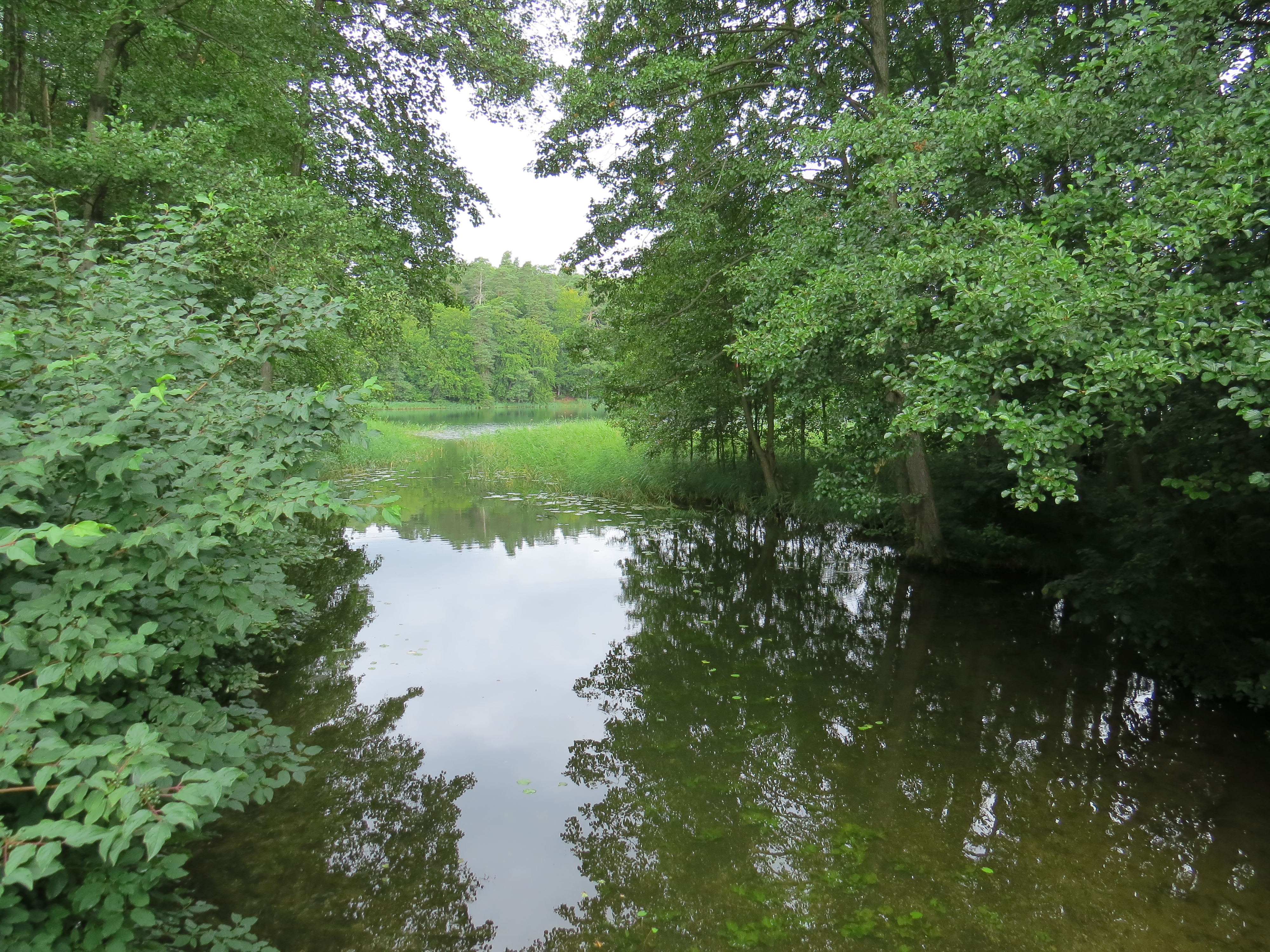 Lychen, Zenssee